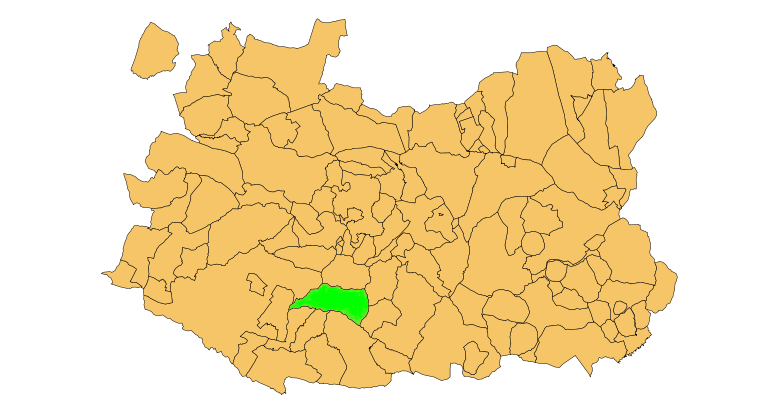 Localización del municipio de Puertollano